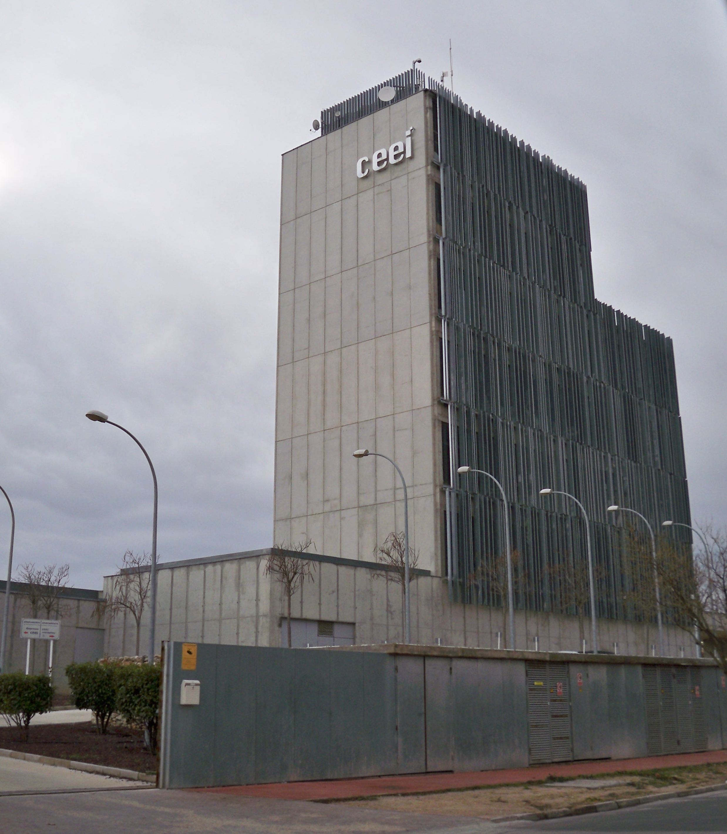 Imagen lateral del Centro Europeo de Empresas e Innovación en la ciudad de Albacete, situado en el Parque Empresarial de Campollano